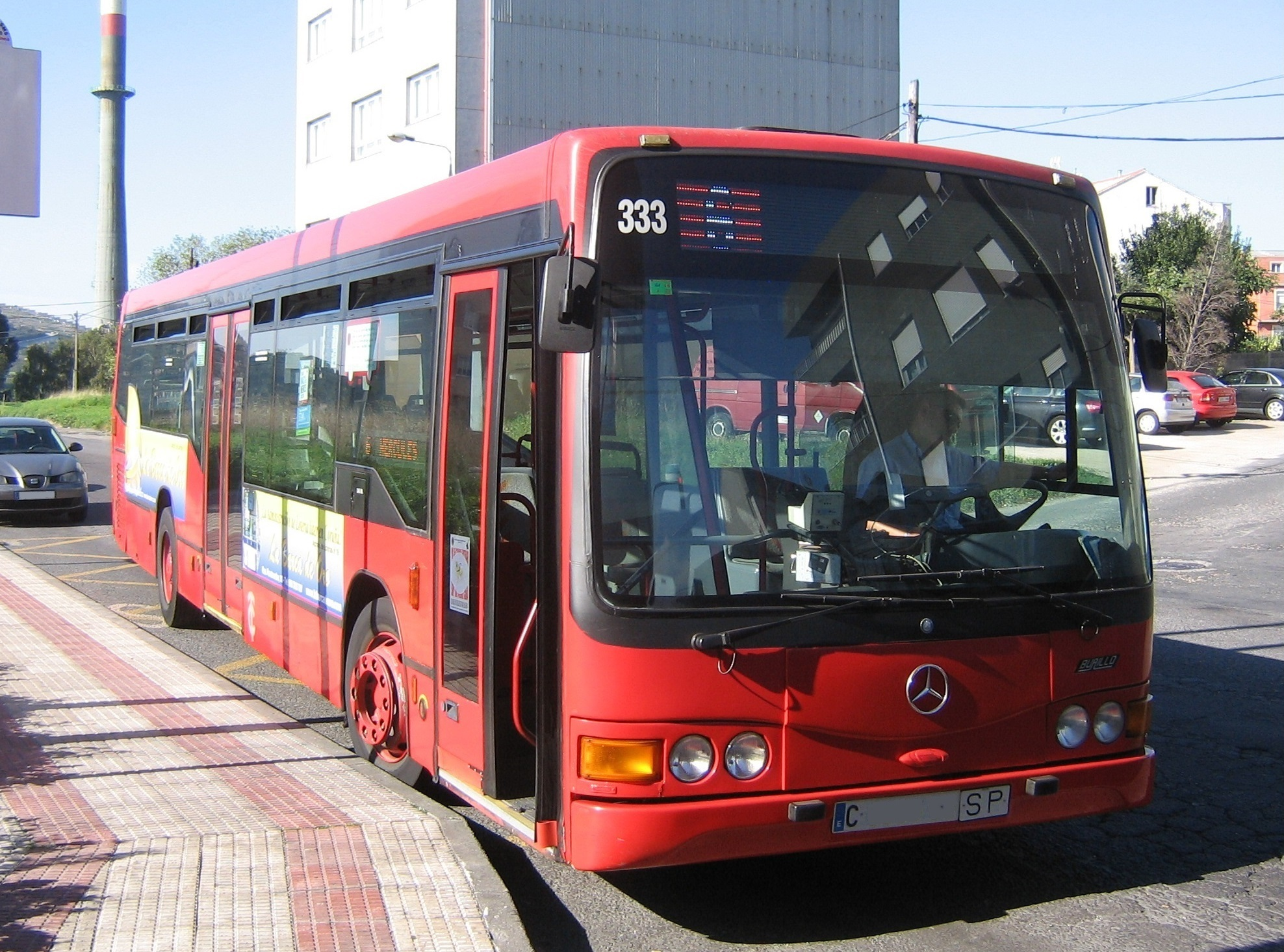 Un autobús urbano coruñés.